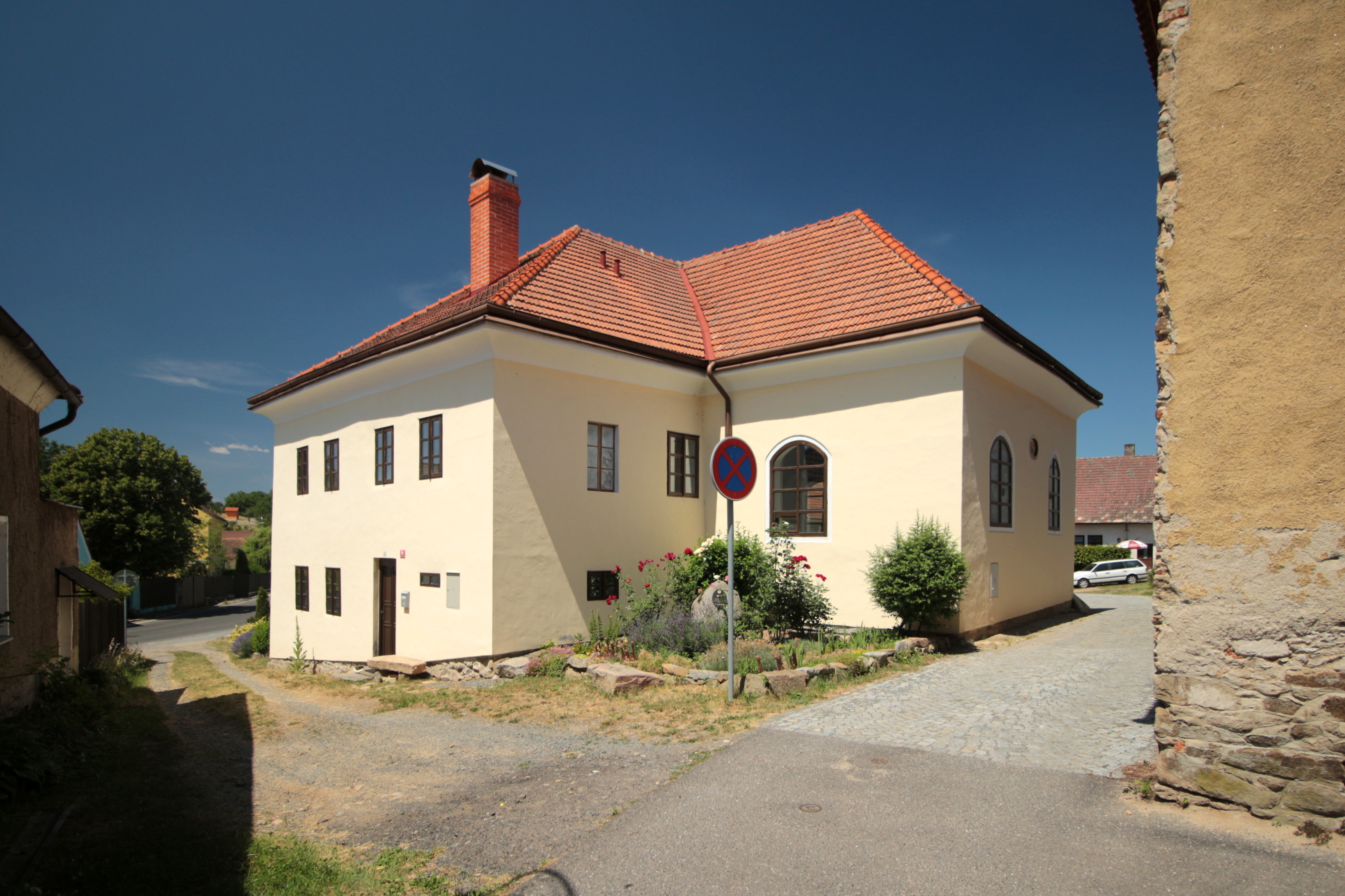 Kosova Hora, židovská čtvrť